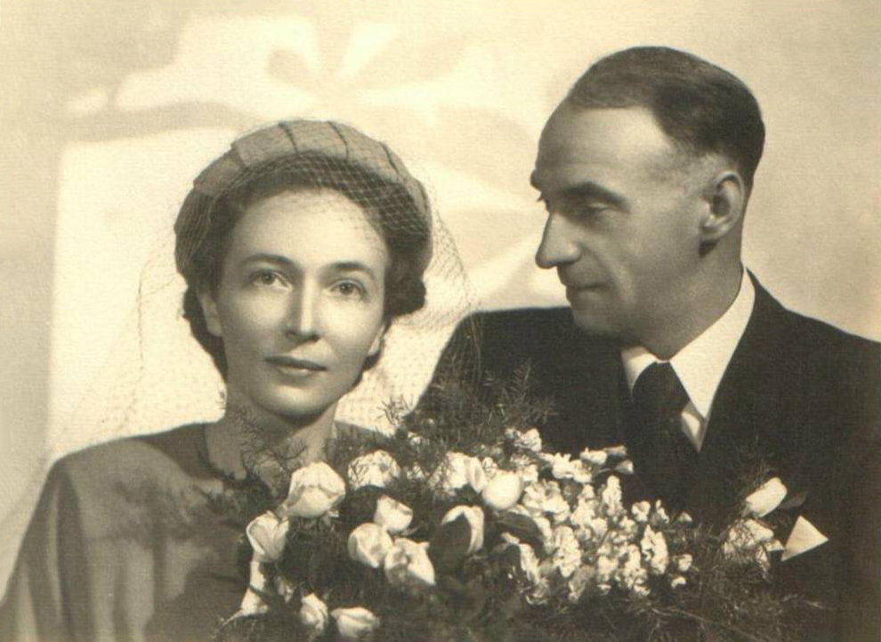 Tadeusz Vetulani i Maria z domu Godlewska – fotografia ślubna.